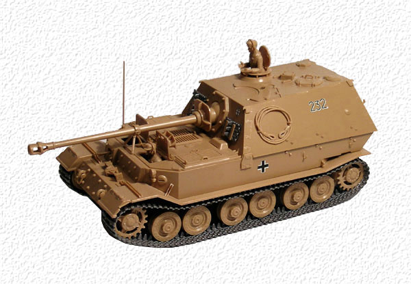 Неокрашенная модель САУ "Элефант" производства российской фирмы "Звезда" (по лицензии итальянской фирмы Italeri)